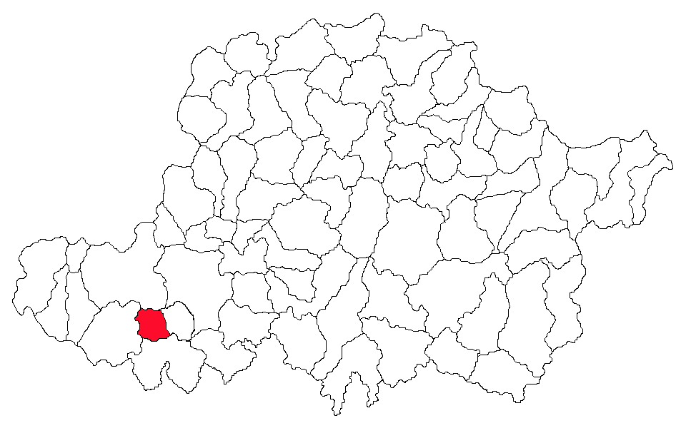 Categorie:Hărţi ale judeţului Arad